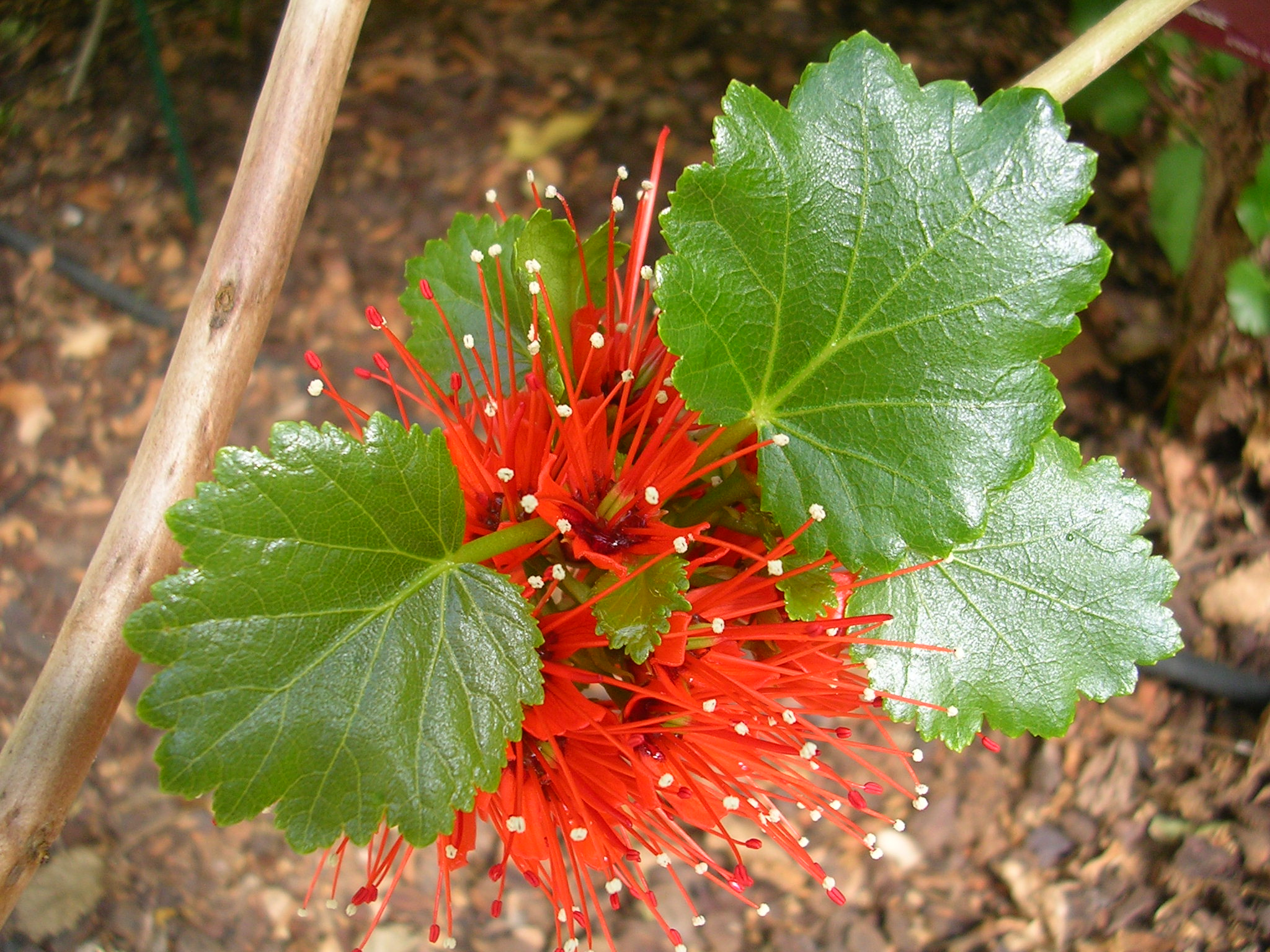 Greyia sutherlandii, Melianthaceae Photographie personnelle prise au Parc Phœnix à Nice, France Escaladix 21:00, 5 April 2006 (UTC)